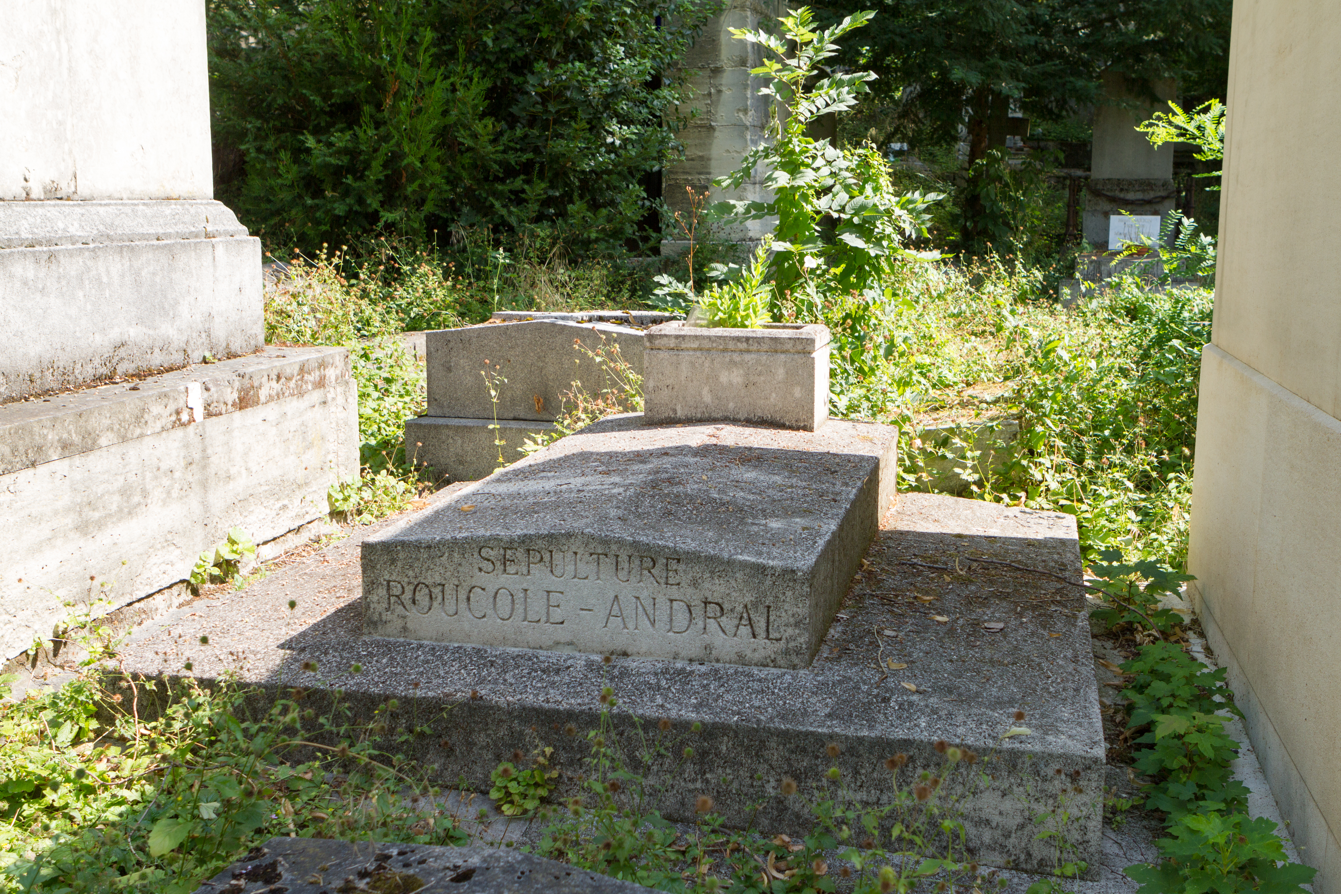 Sépulture de Paule Andral (1879-1956), actrice. .